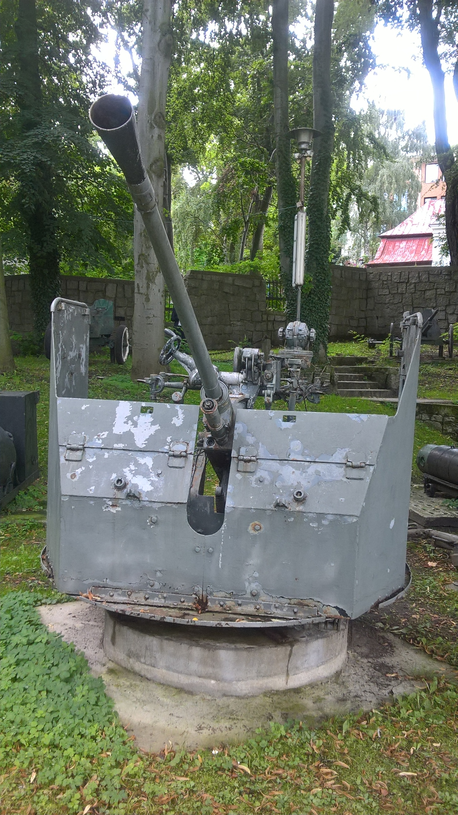 Armata przeciwlotnicza 70-K kal. 37 mm eksponowana w Muzeum Marynarki Wojennej w Gdyni.